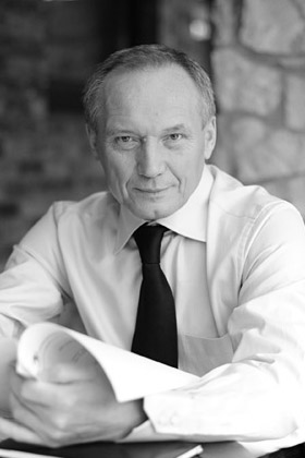 Владимир Некляев, сентябрь 2010 года